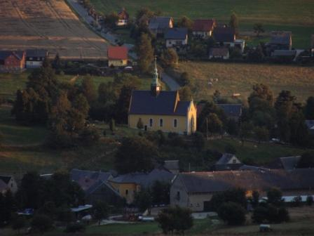 Engelkirche in Hinterhermsdorf vom Weifbergturm aus aufgenommen